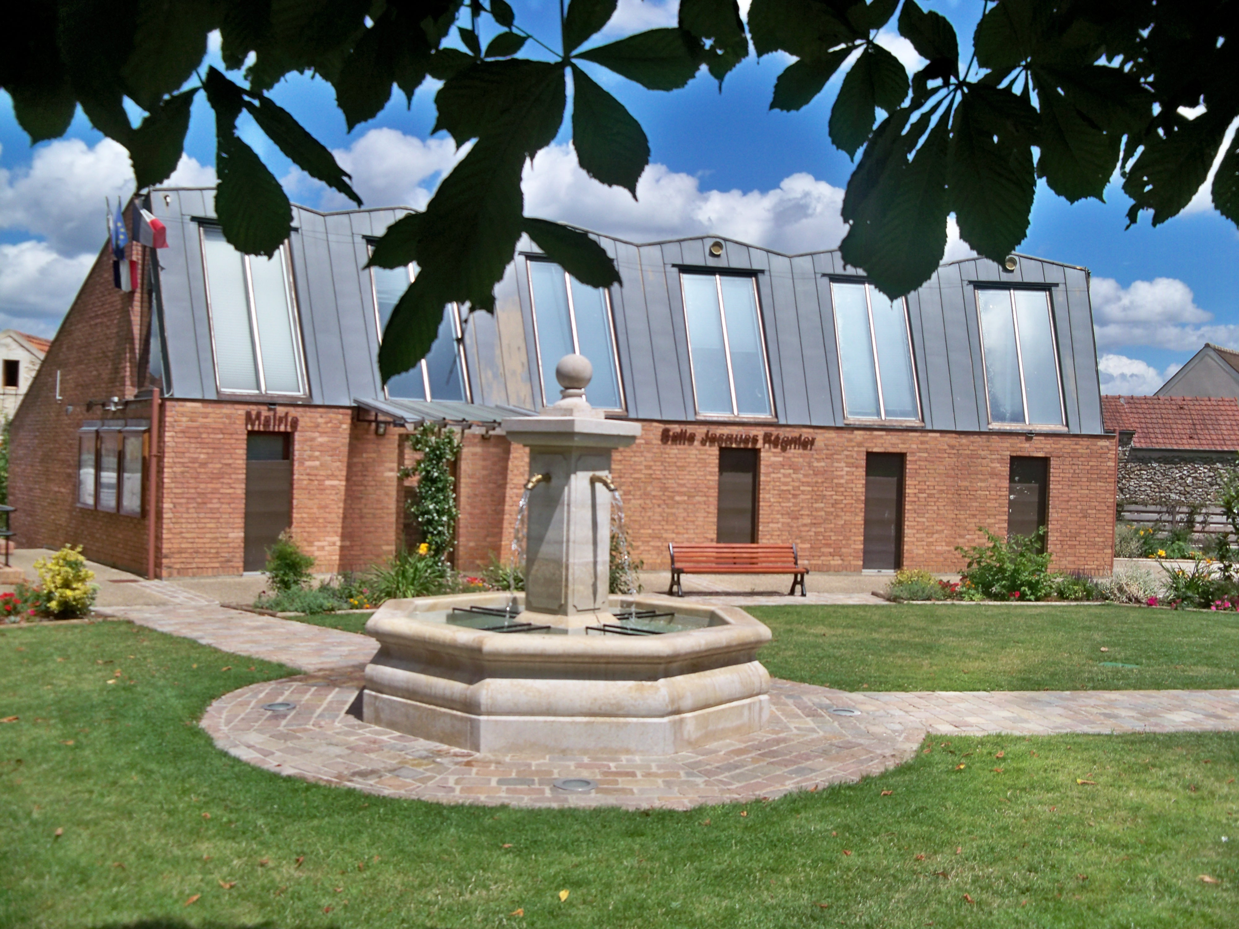 Mairie et salle municipale de Pecqueuse, Essonne, France